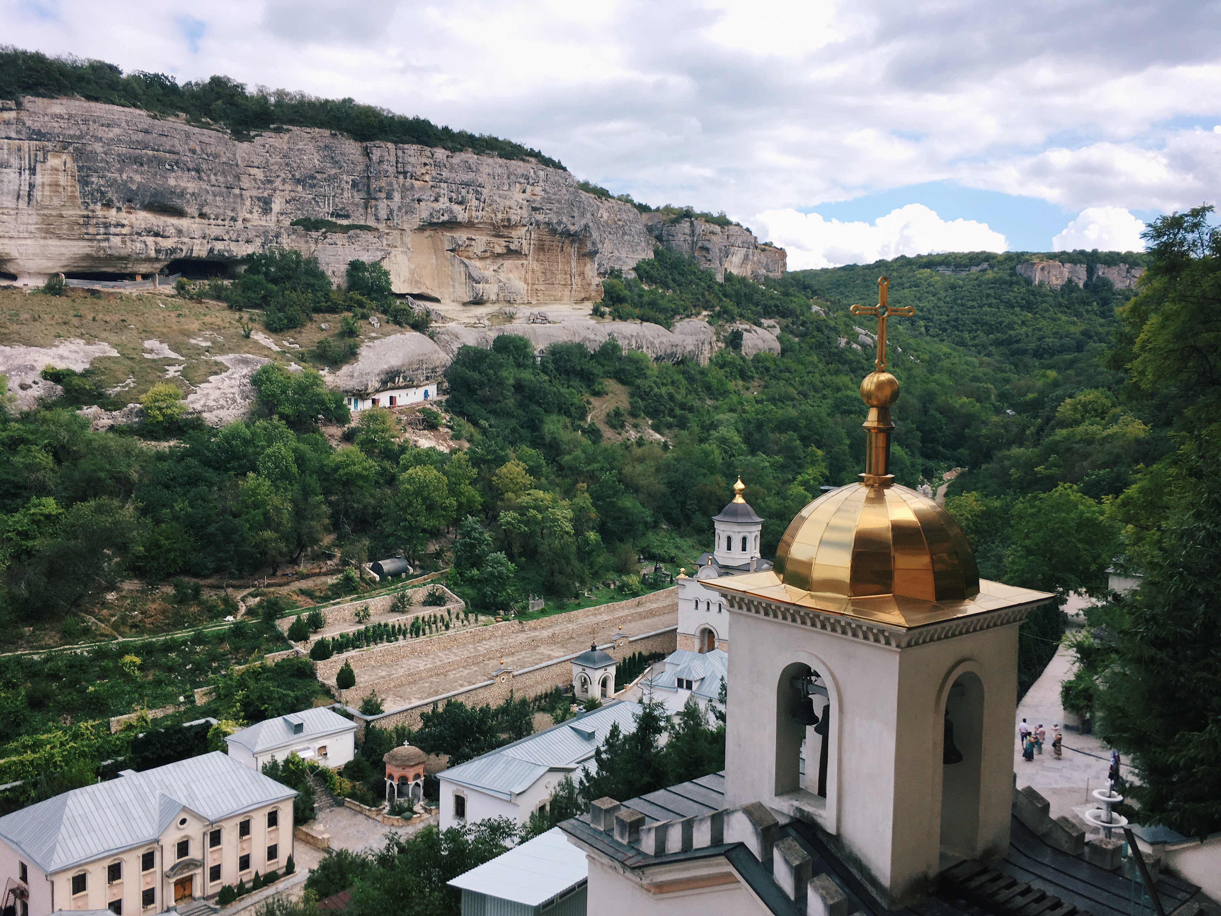 Свято-Успенский пещерный монастырь: Бахчисарай, Бахчисарайский район, Крым This object is located on the Crimean Peninsula and recognized as cultural heritage by Russia under the monument ID: 8232034000. The legal status of the Crimean region is currently disputed.